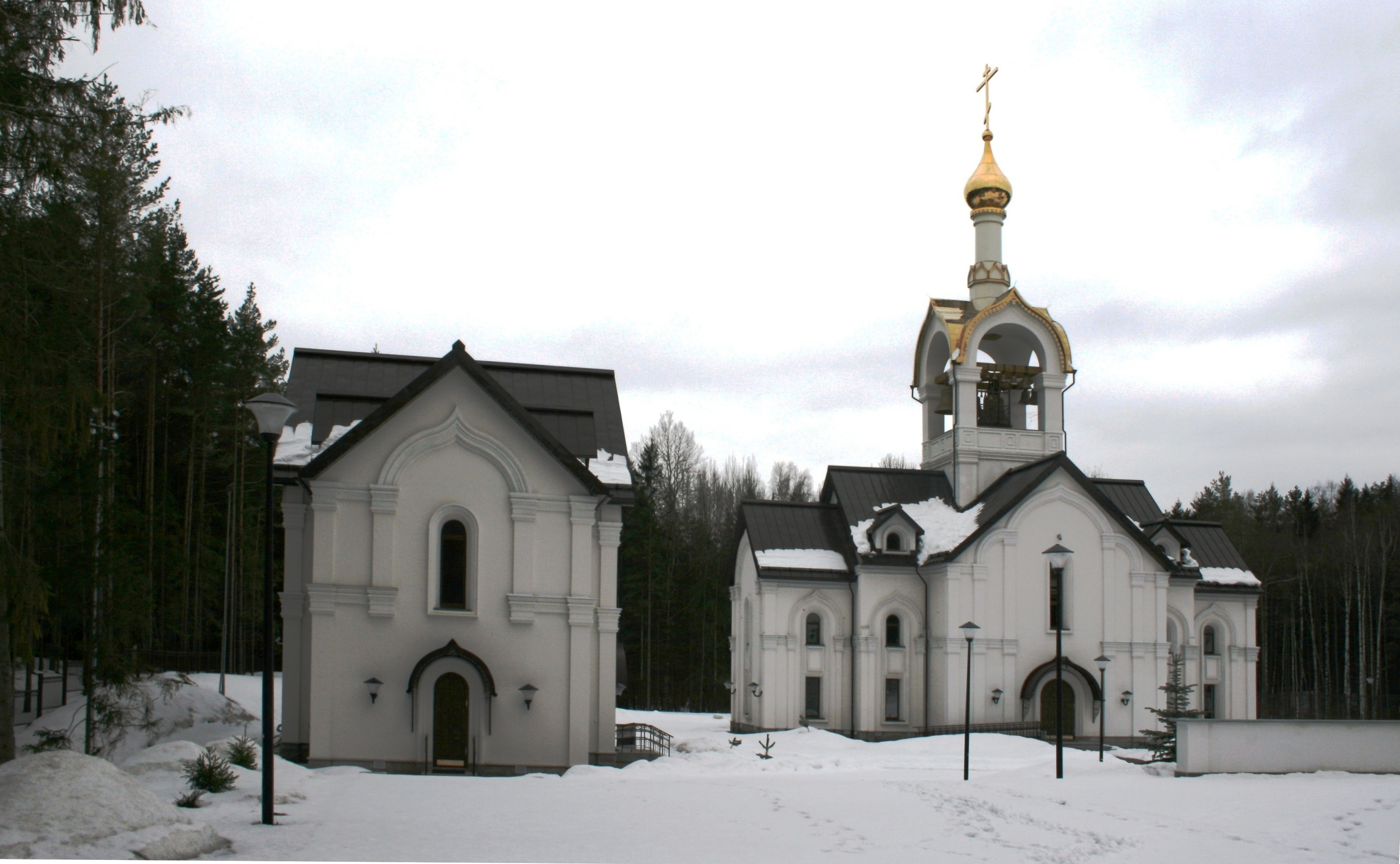 Zaplecze Cerkwi Zmartwychwstania Pańskiego w Katyniu - dzwonnica i budynek gospodarczy